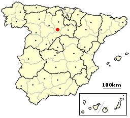 Mapa con la localización de Castrillo de la Vega, en Burgos (España)